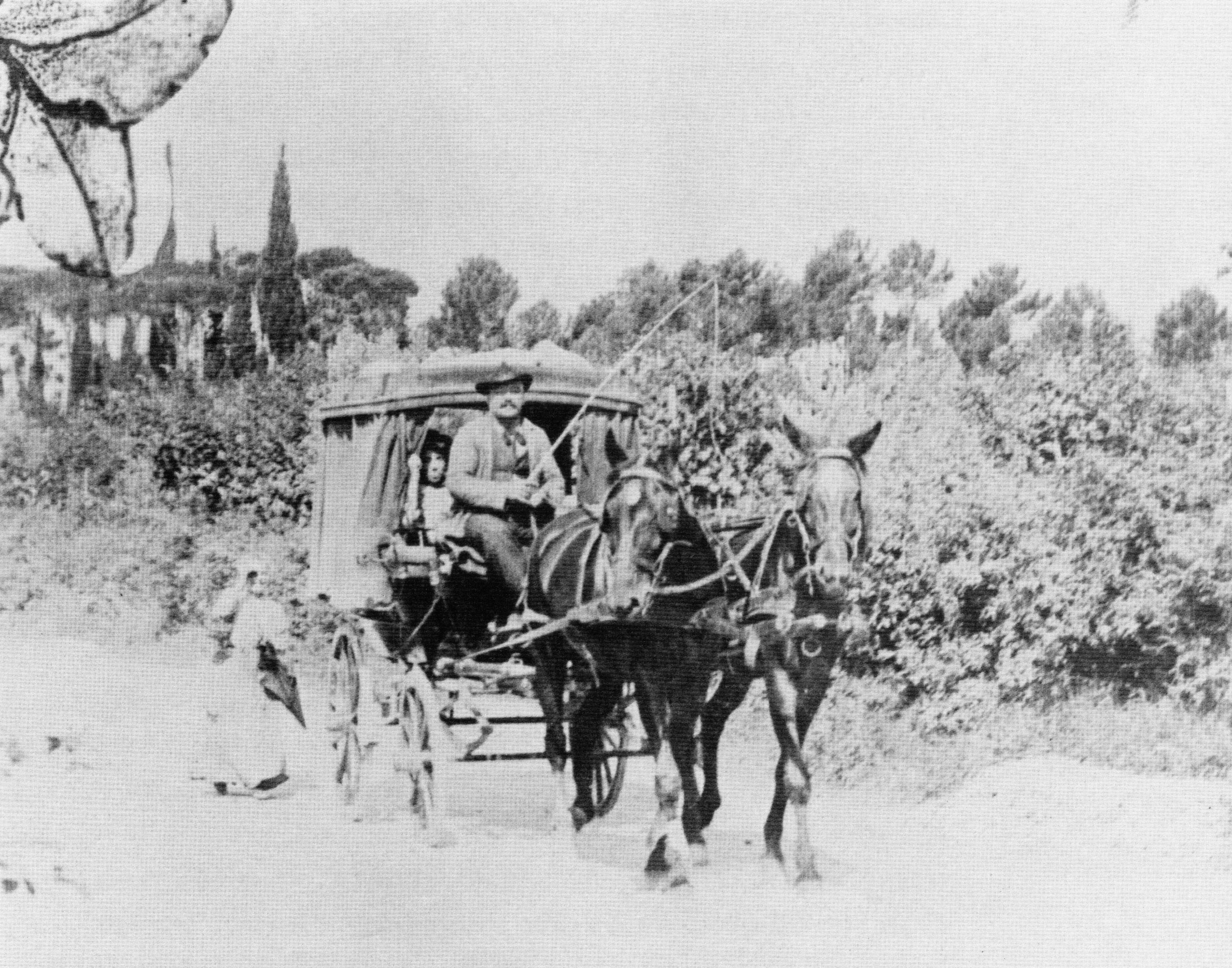 Il servizio di diligenze tra San Casciano in Val di Pesa e Mercatale gestito dal signor Silvio Chiesi